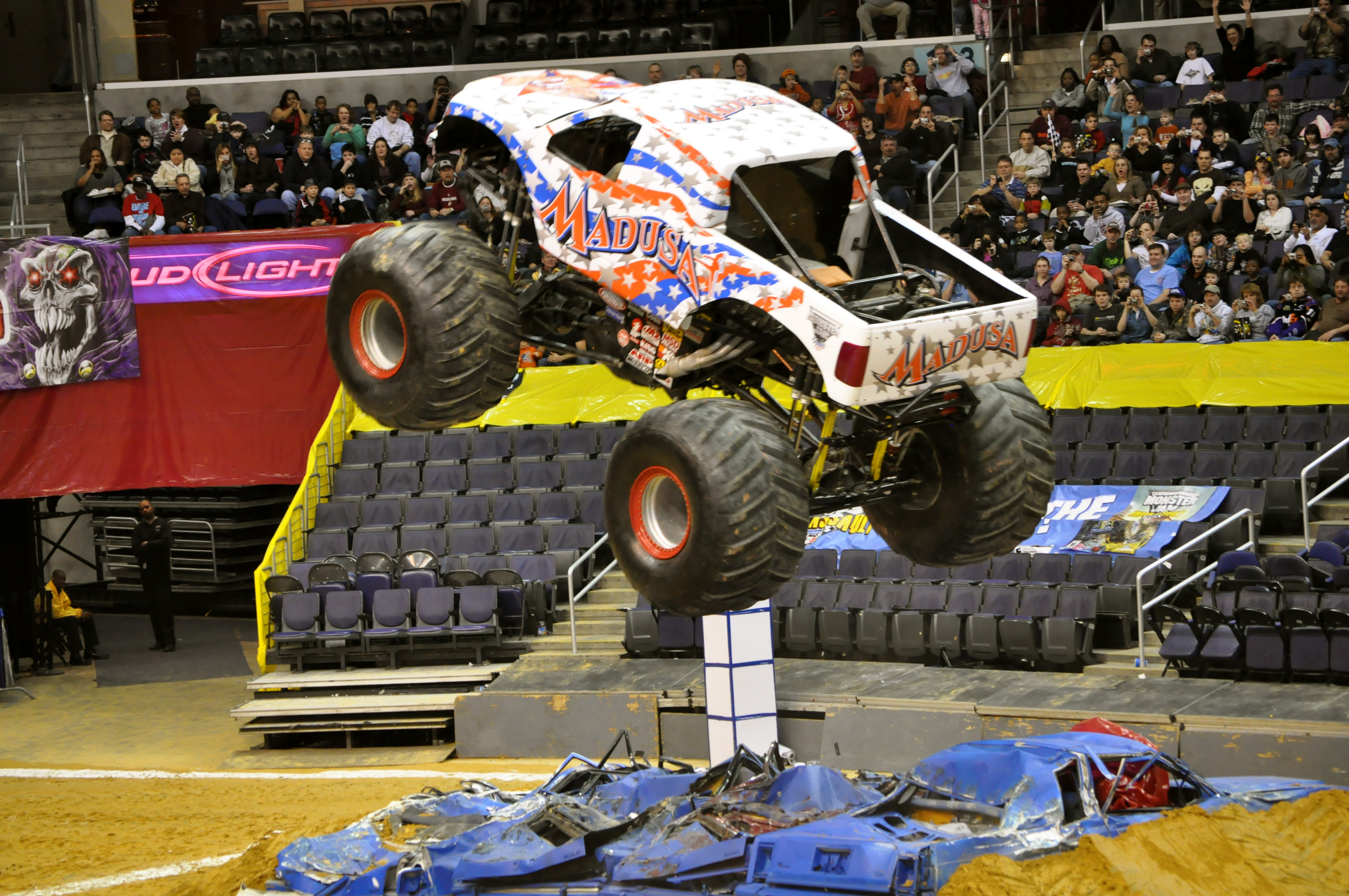 Madusa, le monster truck de l'ancienne catcheuse Debra Miceli en janvier 2009.